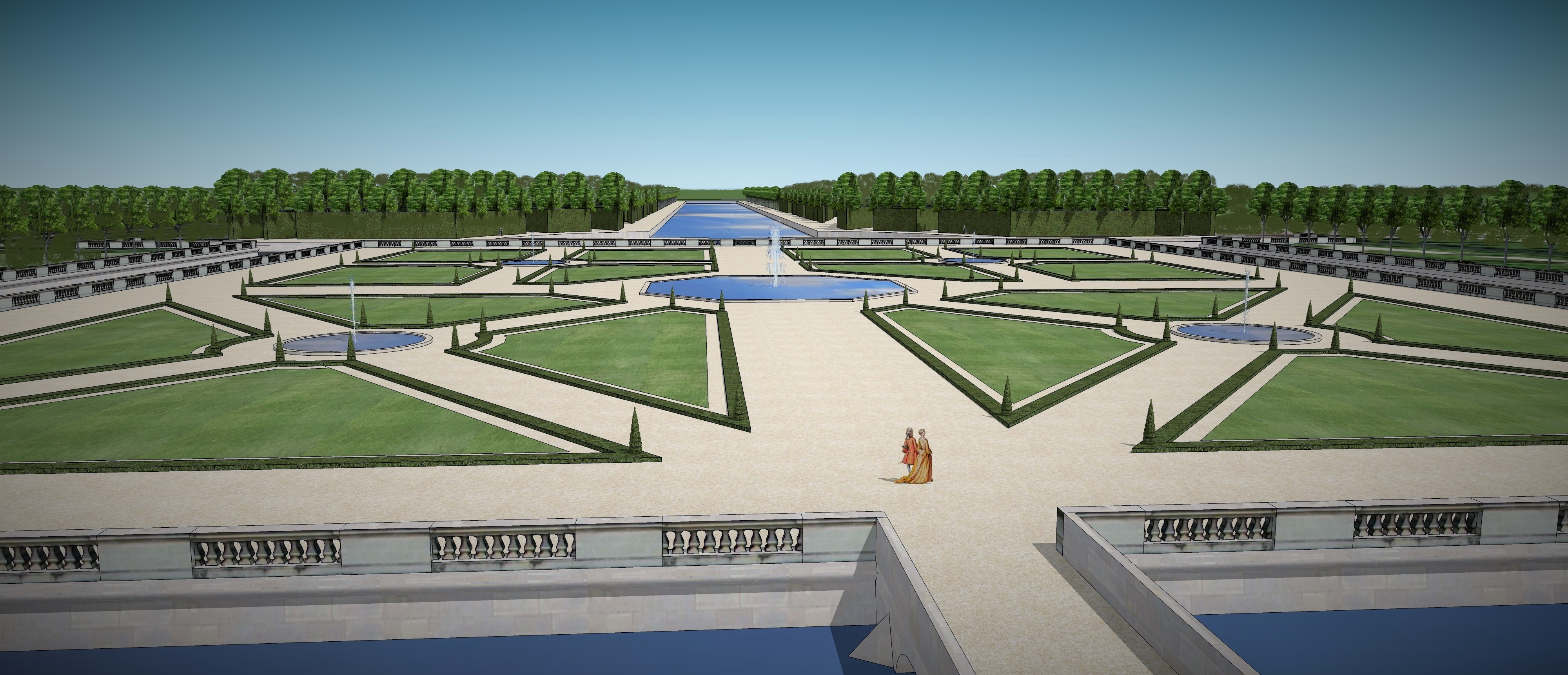 Vue de la Grande Perspective des jardins du château de Coulommiers, depuis le haut de l'escalier central. Vers 1660.